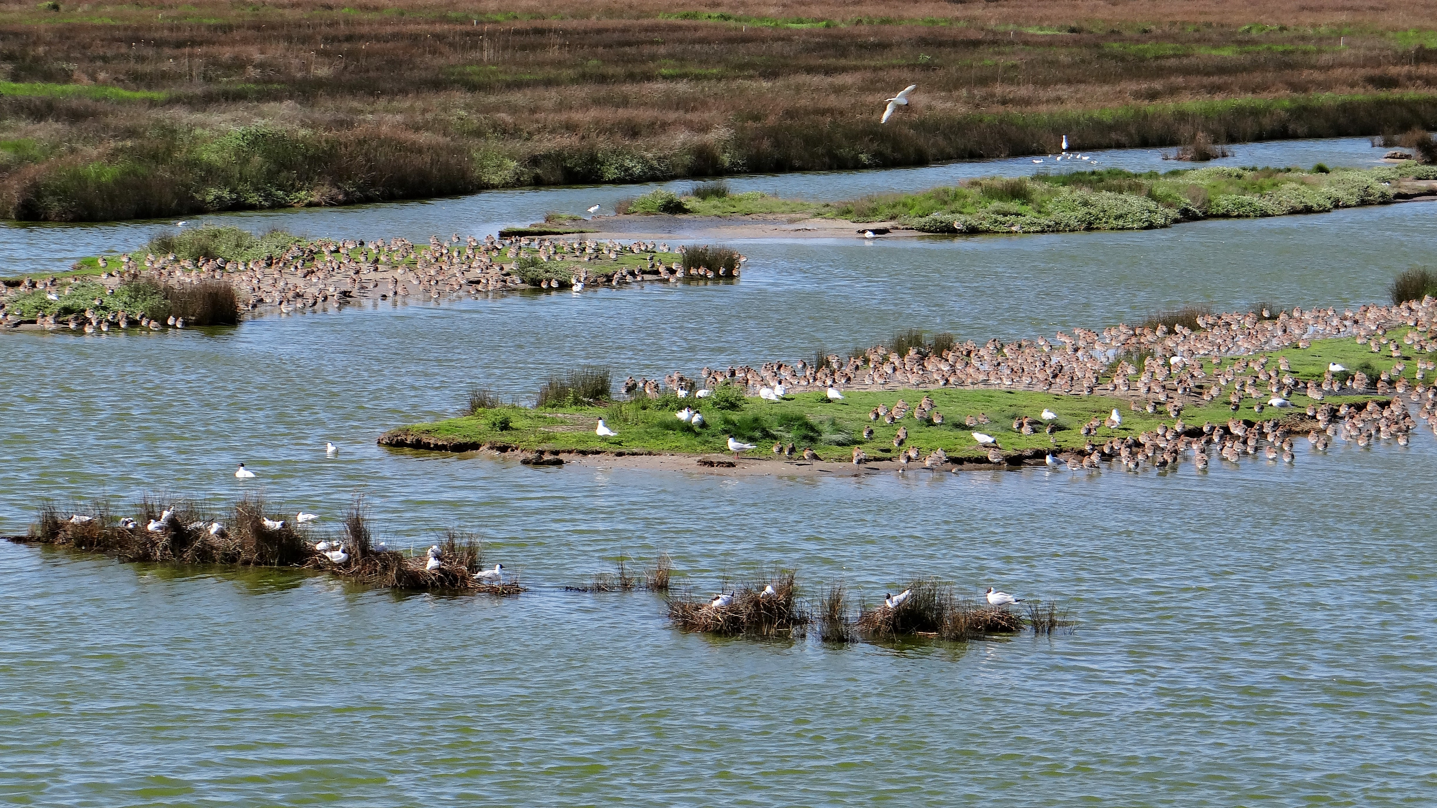 Réserve naturelle régionale du polder de Sébastopol